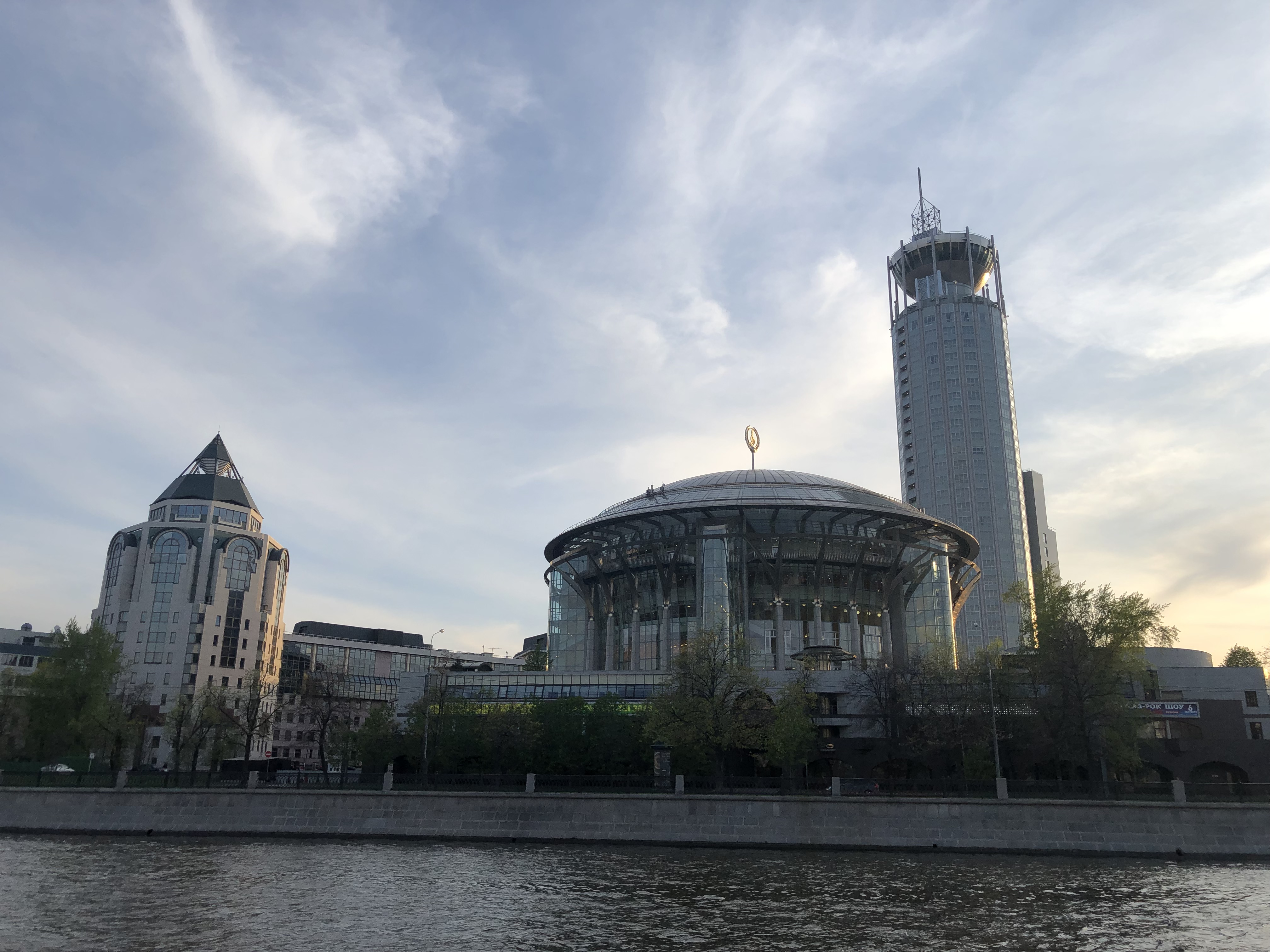 Дом музыки